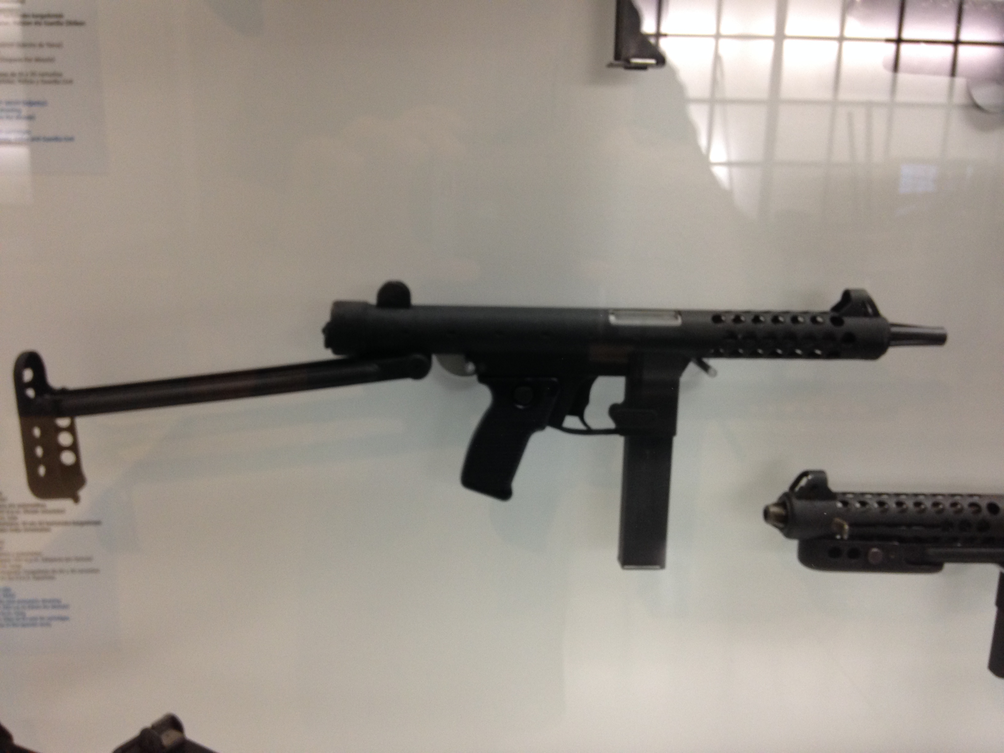 Museo de la Industria Armera de Éibar. Subfusil Z-62 fabricado por STAR de Eibar.